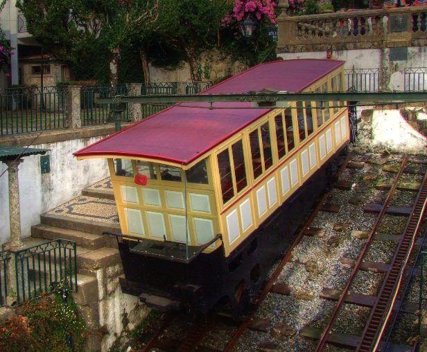 Carro do lado noroeste na estação-topo, depois da renovação de 2006.